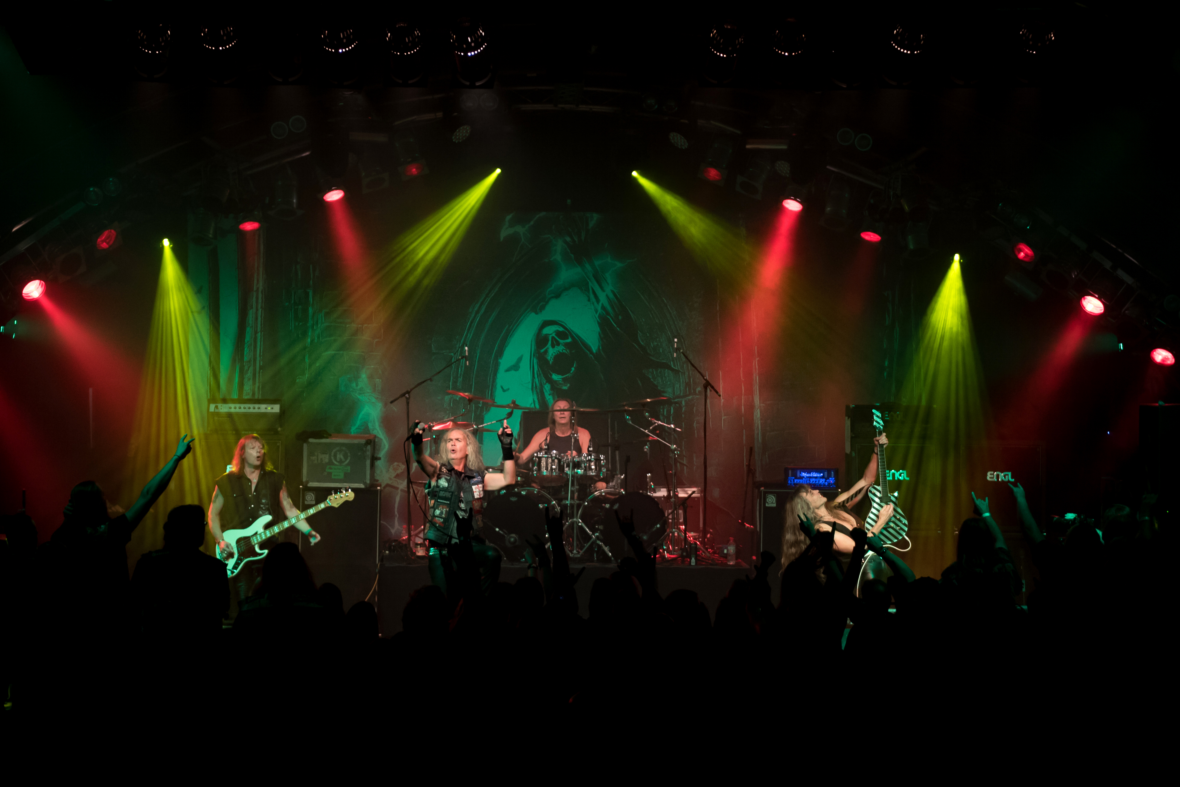 Grave Digger live bei den Hamburg Metalö Dayz 2017